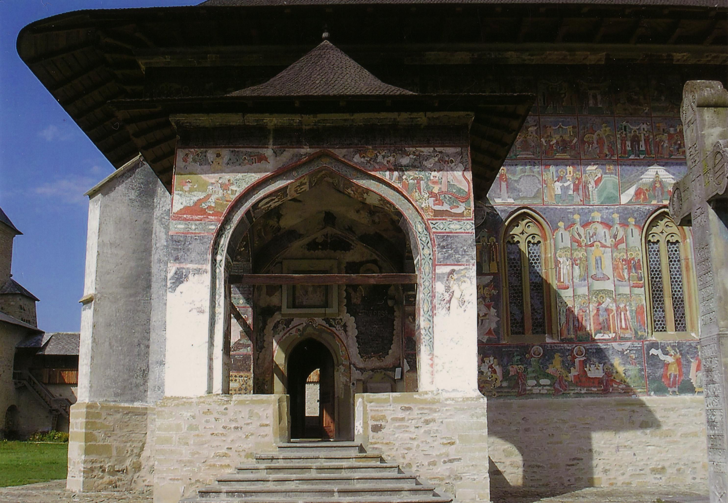 Sucevita: A kolostortemplom délkeleti bejárata 01